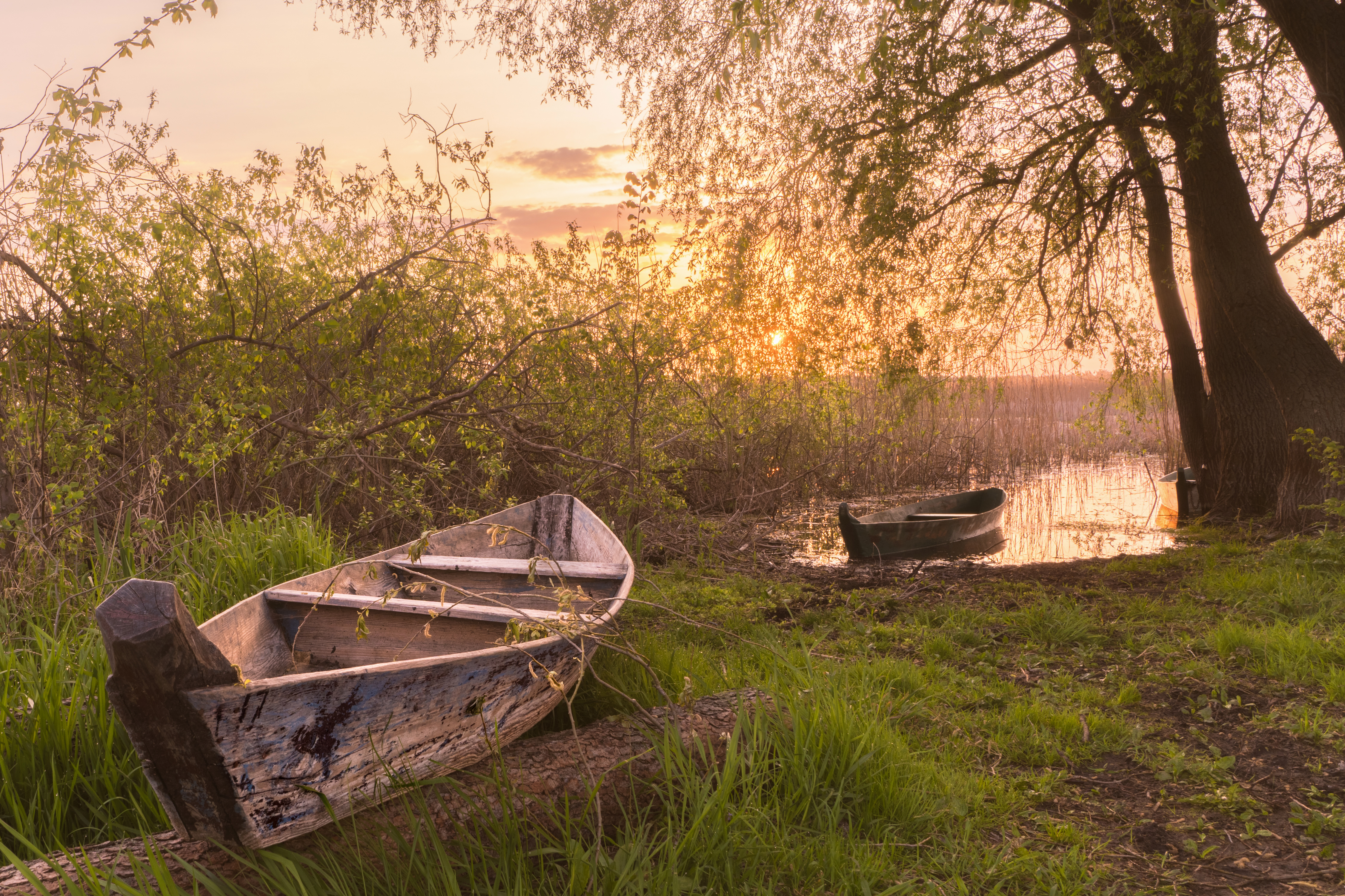 Нижньосульський, Оржицький р-н: околиці сіл Великоселецьке, Малоселецьке, Плехів, Онішки, Чутівка. Сулинська затока Кременчуцького водосховища, Глобинський р-н: в околицях с. Липове. Семенівський р-н: в околицях сіл Горошине, Погребняки, Дем'янівка